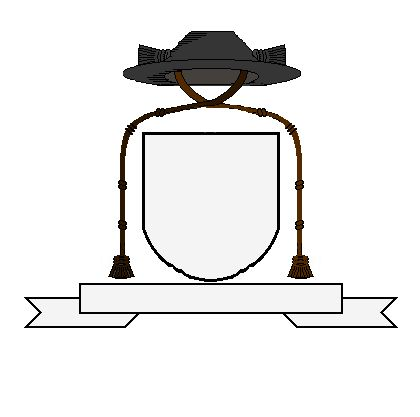 Priesterwapen. Iedere priester in de Rooms katholieke kerk is gerechtigd een priesterhoed met twee kwasten en een zelfgekozen devies aan zijn wapenschild toe te voegen. De knopen en de wijze waarop de kwasten van de hoed afhangen zijn heraldisch zonder enige betekenis. De knopen (fiochi) werden door mij toegevoegd omdat we anders te weinig evenwicht in de tekening was. Lussen zijn ook al naar gelang er een ruimte moest worden overbrugd aangebracht. Ook hier is evenwicht in de tekening naar goed heraldisch gebruik het doel . Eigen tekening. Robert Prummel